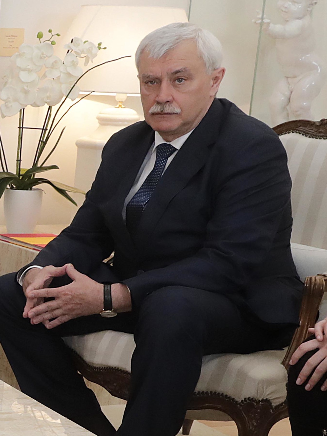 Visita del gobernador de San Petersburgo, G. Poltávchenko, y del embajador de la Federación de Rusia, Yuri Korchagin, en España a la presidenta de la Comunidad de Madrid, Cristina Cifuentes.